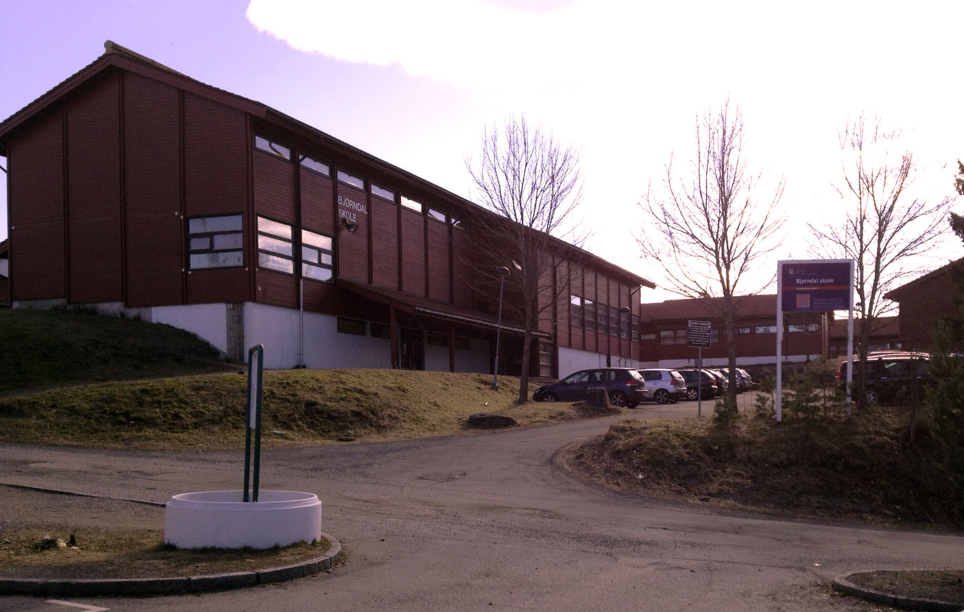 Bjørndal skole i Oslo